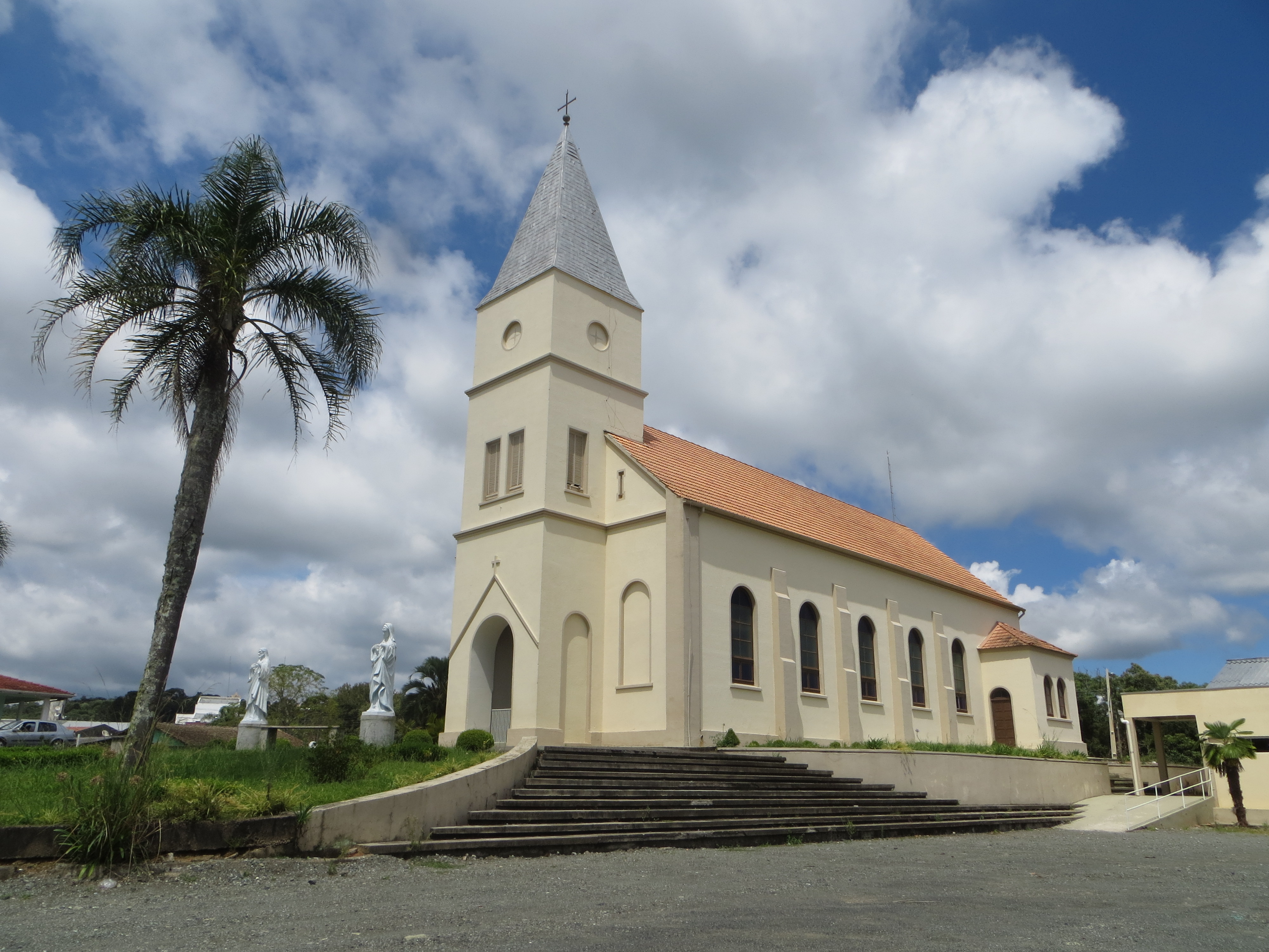 Igreja Matriz de Nossa Senhora das Graças em Piên, Estado do Paraná, Região Sul do Brasil.